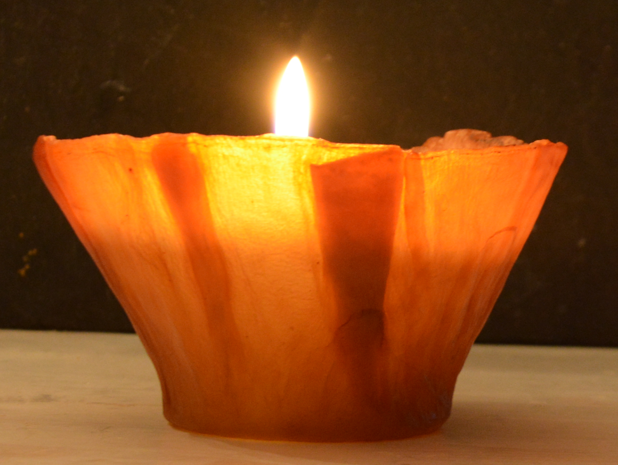 Photophore réalisé avec une symbiote de kombucha, c'est à dire la "mère" de kombucha qui flotte au-dessus de la préparation